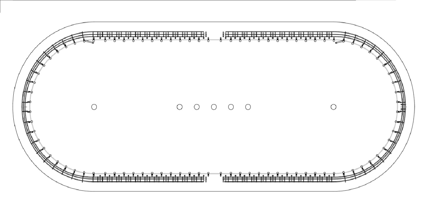 Construção indígena feita em ripas de madeira, bambu e palha.